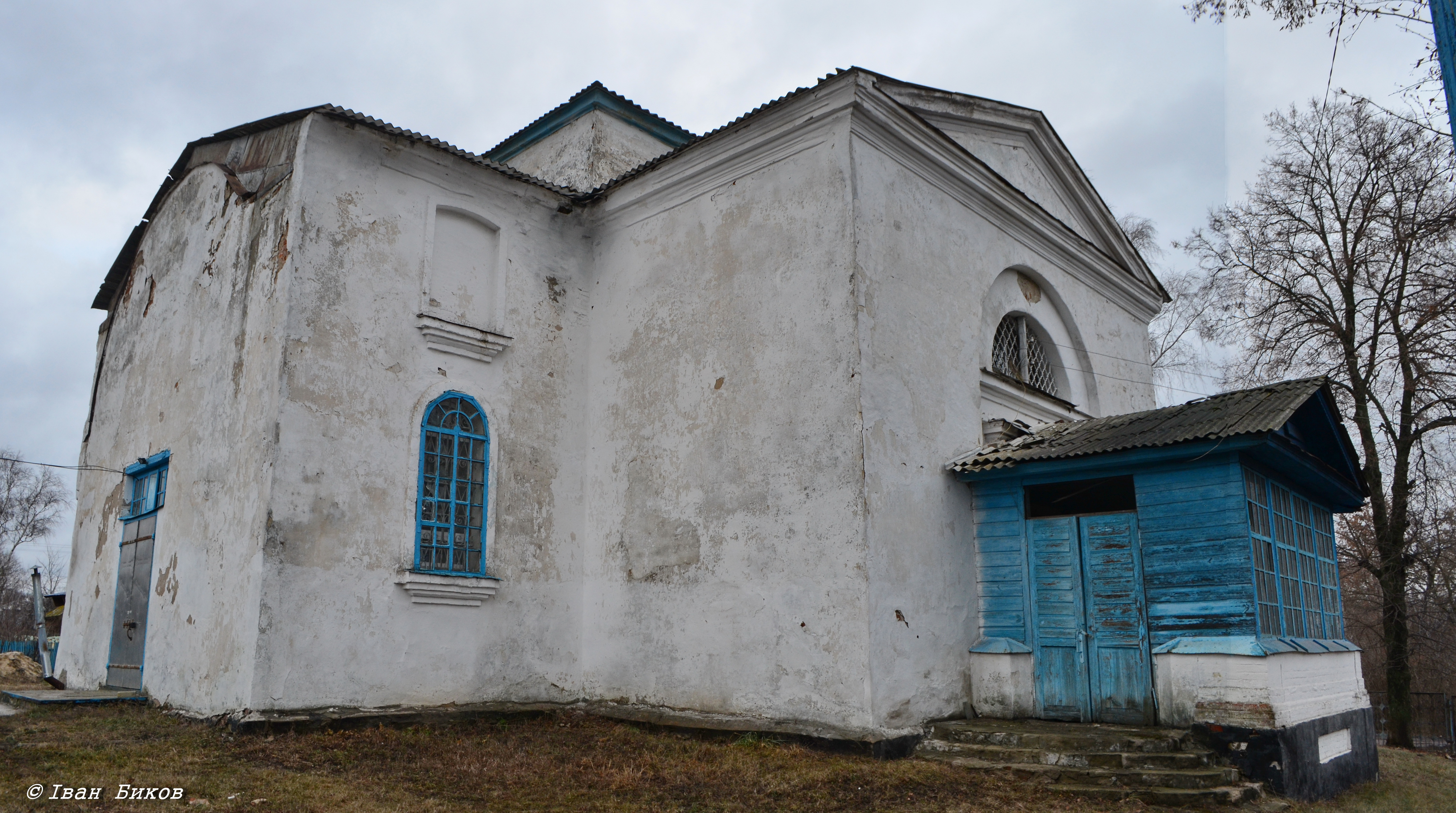 Покровська церква, село Алтинівка, вул. Горького, 48